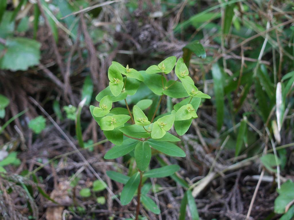 Euphorbia sieboldiana ナツトウダイ 2010.03.22 和歌山県田辺市